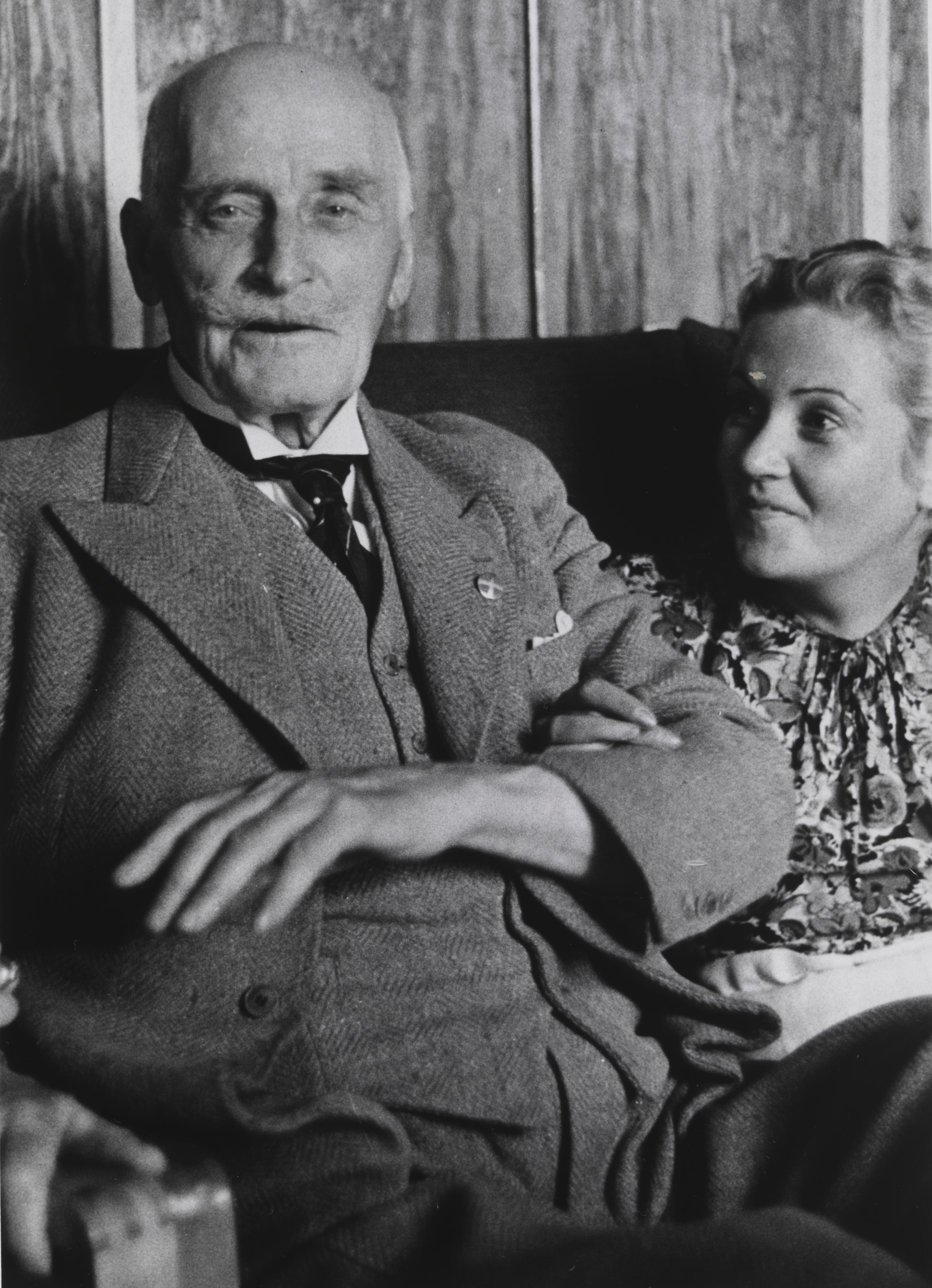 Bildet er hentet fra Nasjonalbibliotekets bildesamling Depicted person: Hamsun, Ellinor Depicted person: Hamsun, Knut